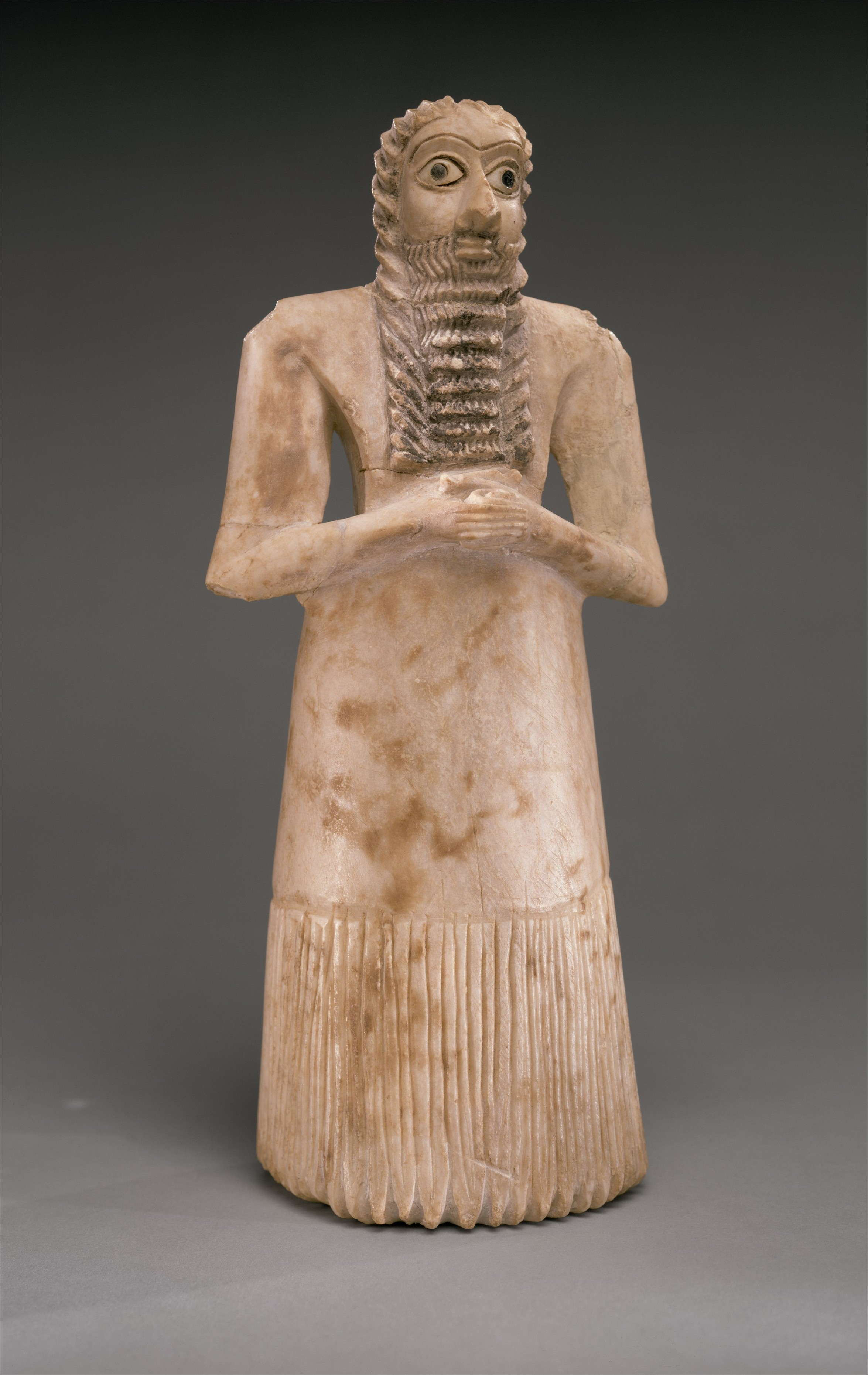 Sumerian; Sculpture; Stone-Sculpture